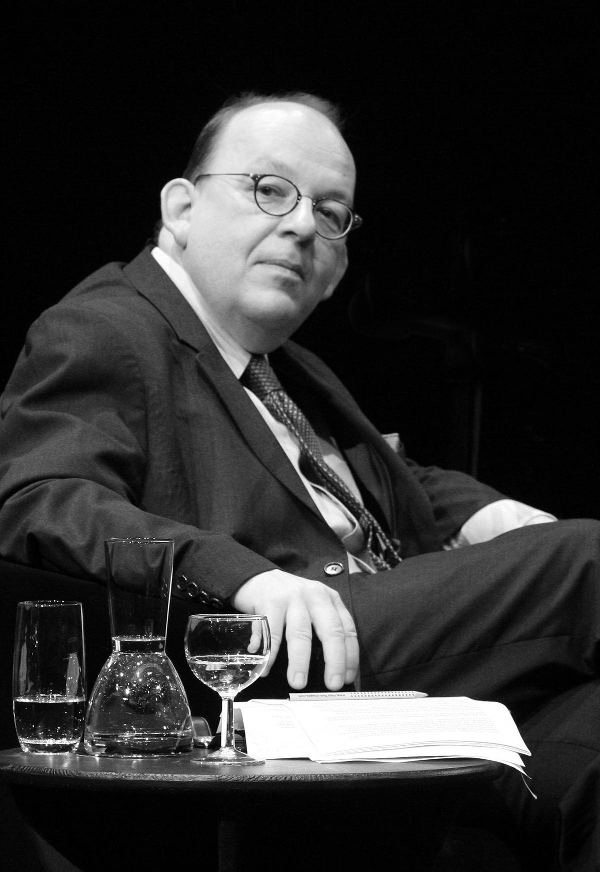 Denis Scheck anlässlich einer Lesung auf dem Literaturfestival lit.Cologne 2010